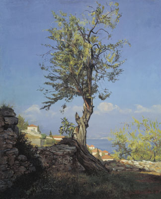 Ugolok starogo sada